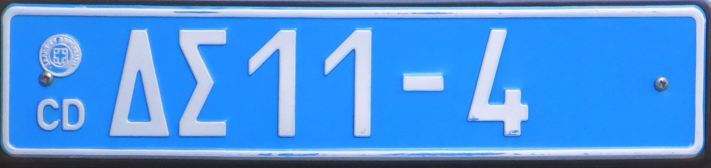 CD kentekenplaat Griekenland